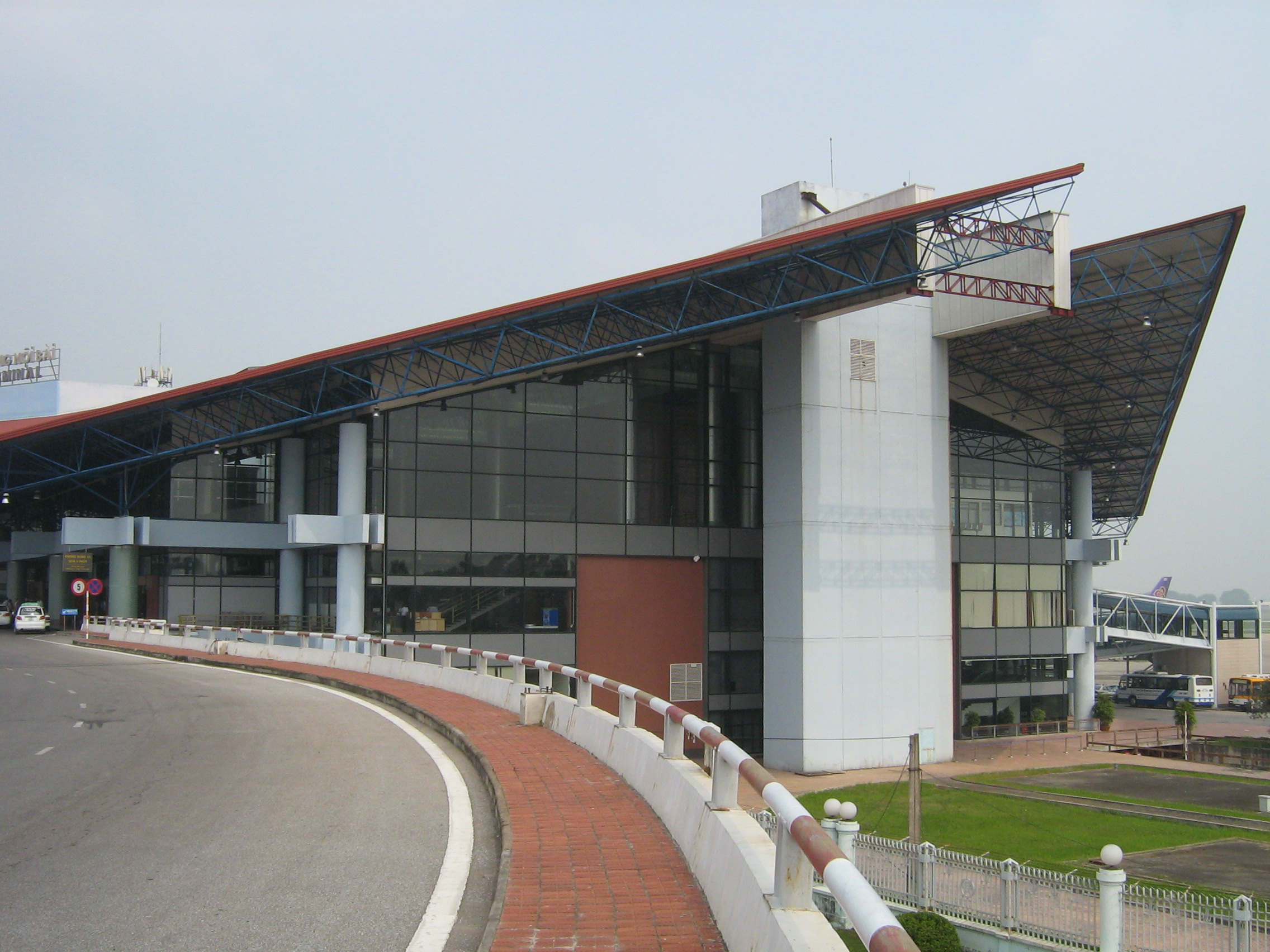 Dachüberhang in Noibai